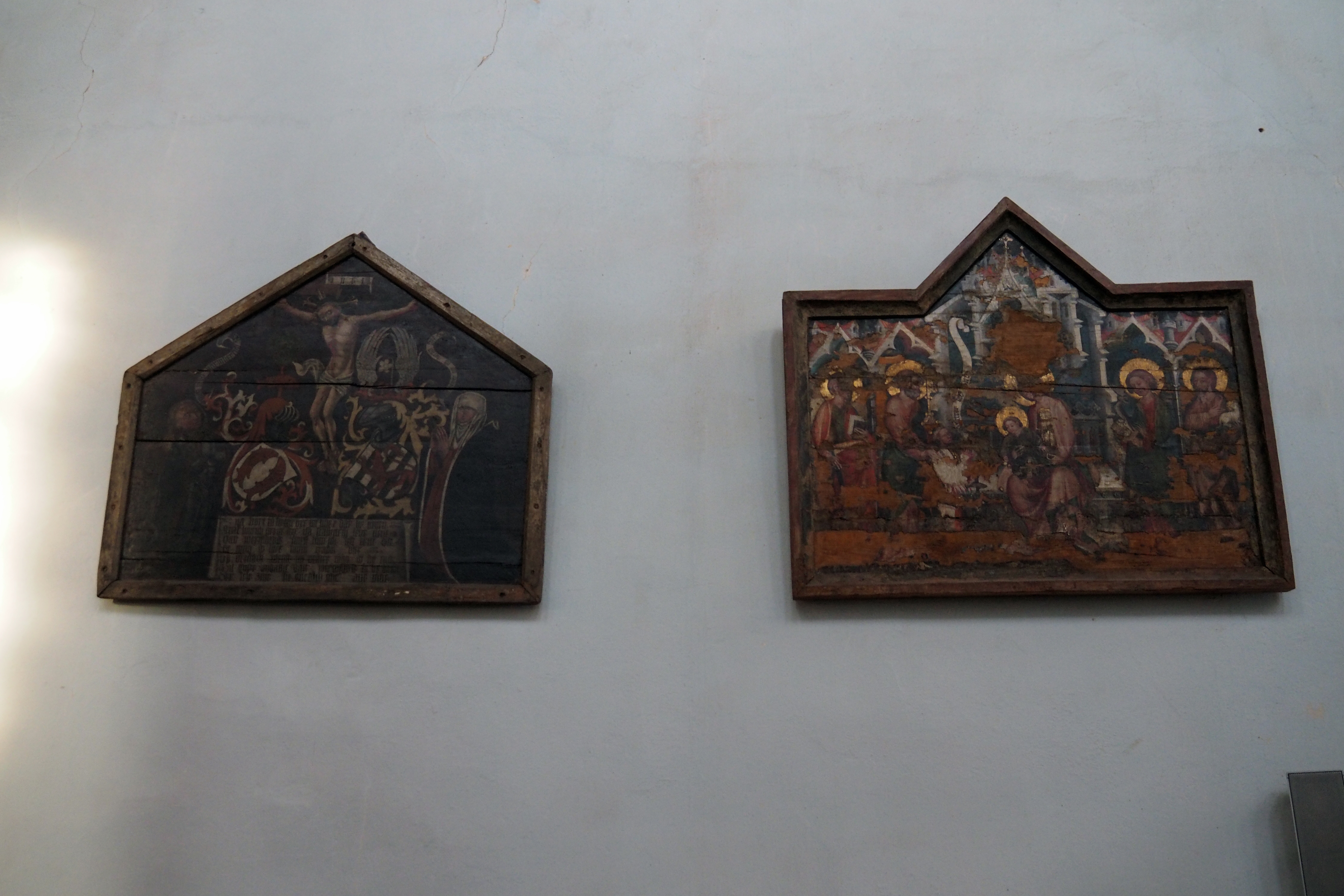 Memorientafeln in der St. Sylvestri-Kirche, Wernigerode